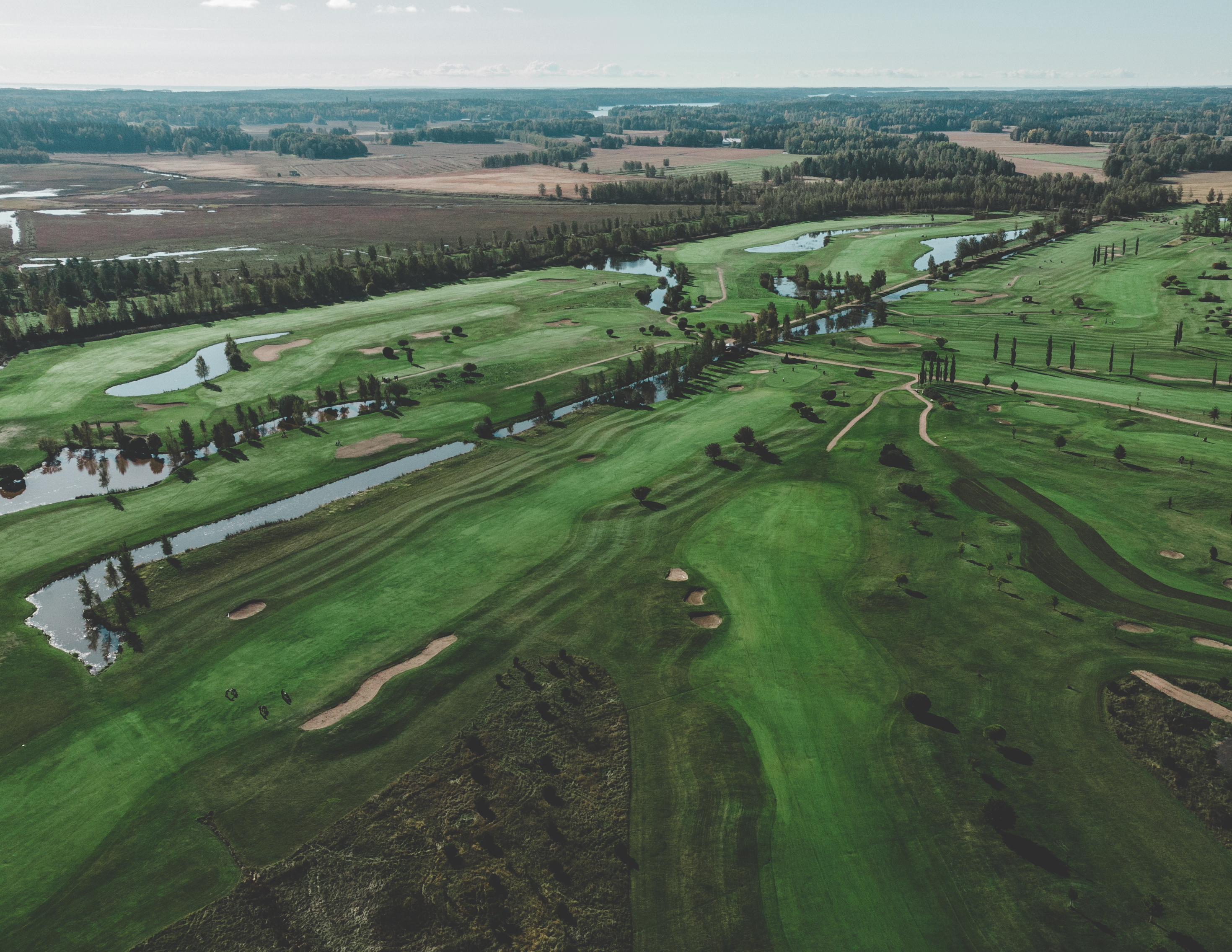 Peuramaa Golfin kentät Porkkala sekä Vanha Peura.